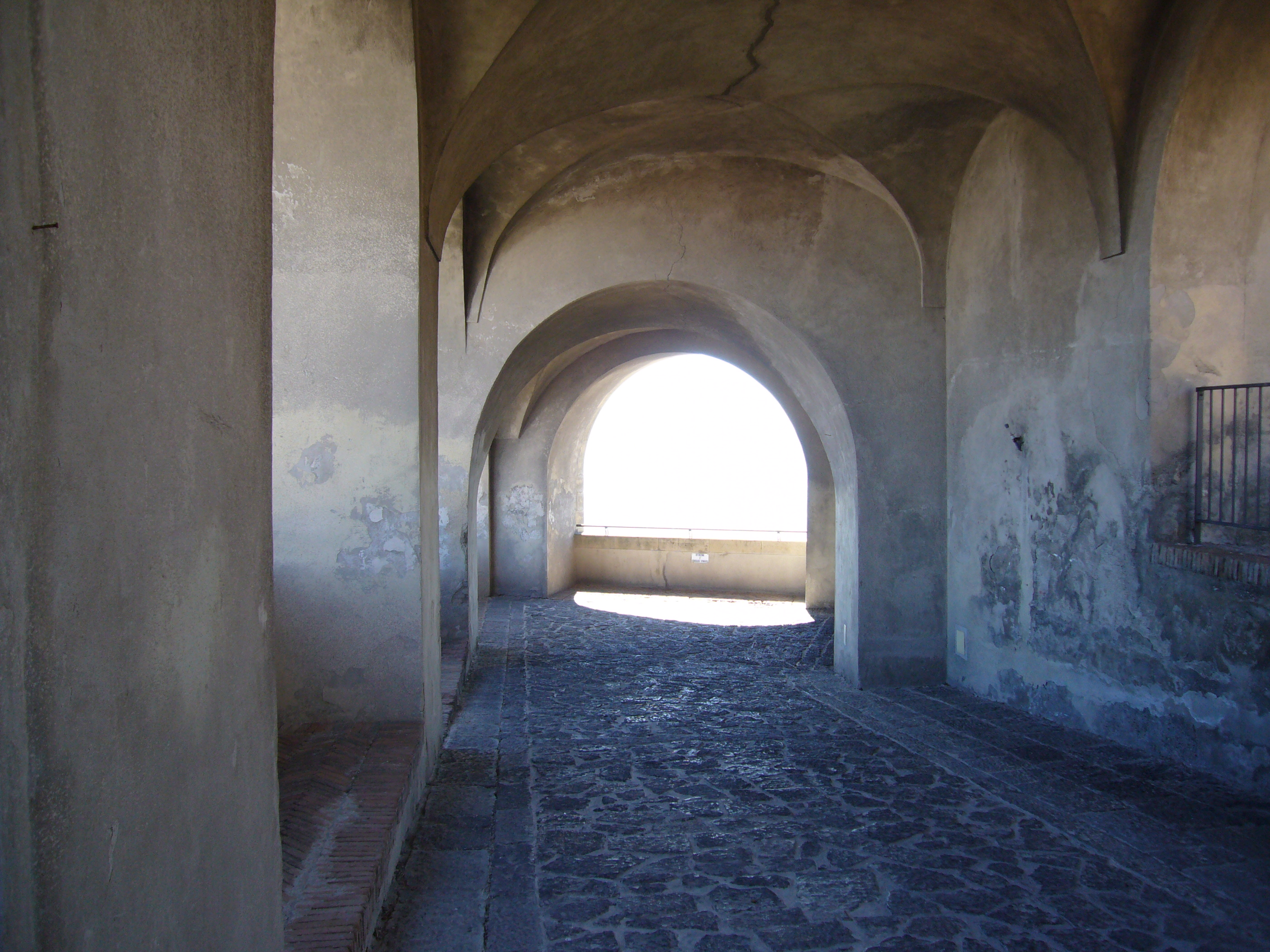 Napoli, Castel Sant'Elmo: rampa interna